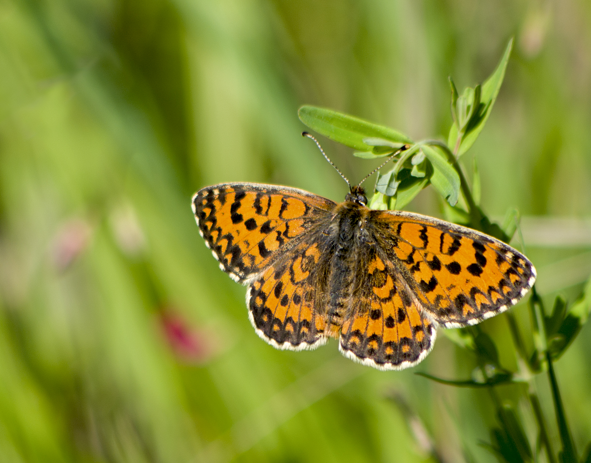 Шашечница тривия / Melitaea trivia / Lesser Spotted Fritillary / Braunlicher Scheckenfalter